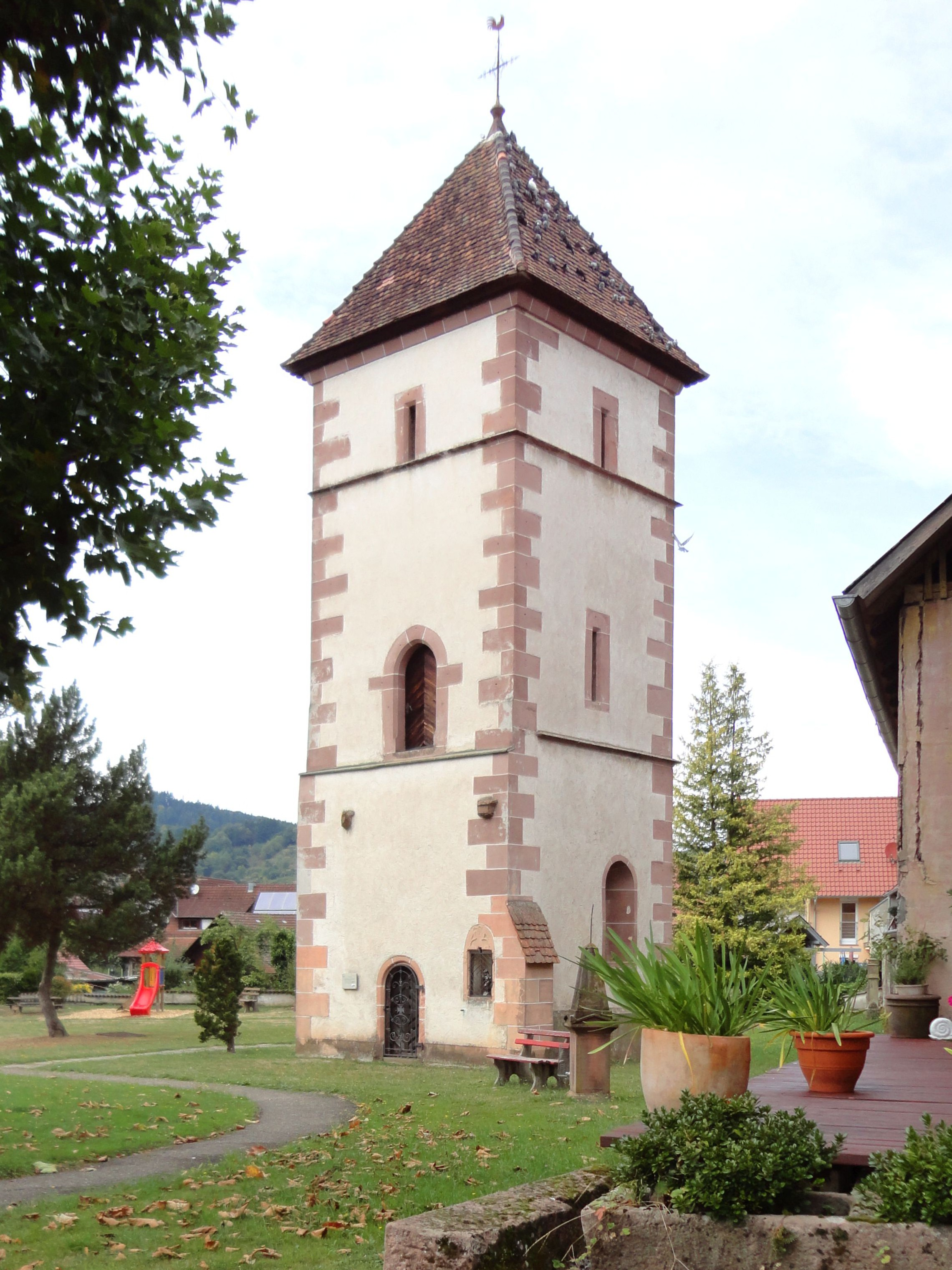 Turm am alten Kirchplatz in Biberach (Baden).